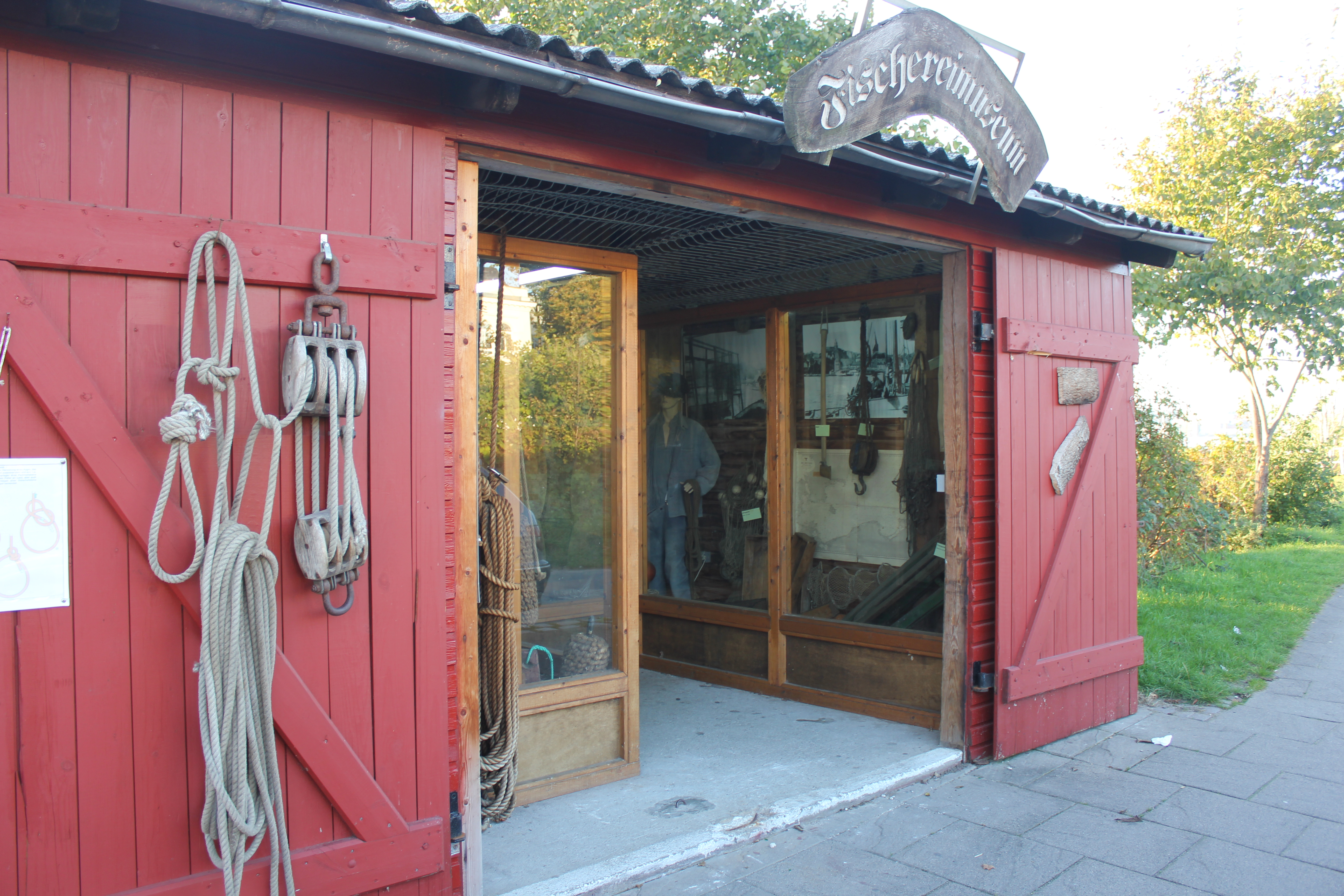 Das Fischereimuseum Flensburg, Bild 02